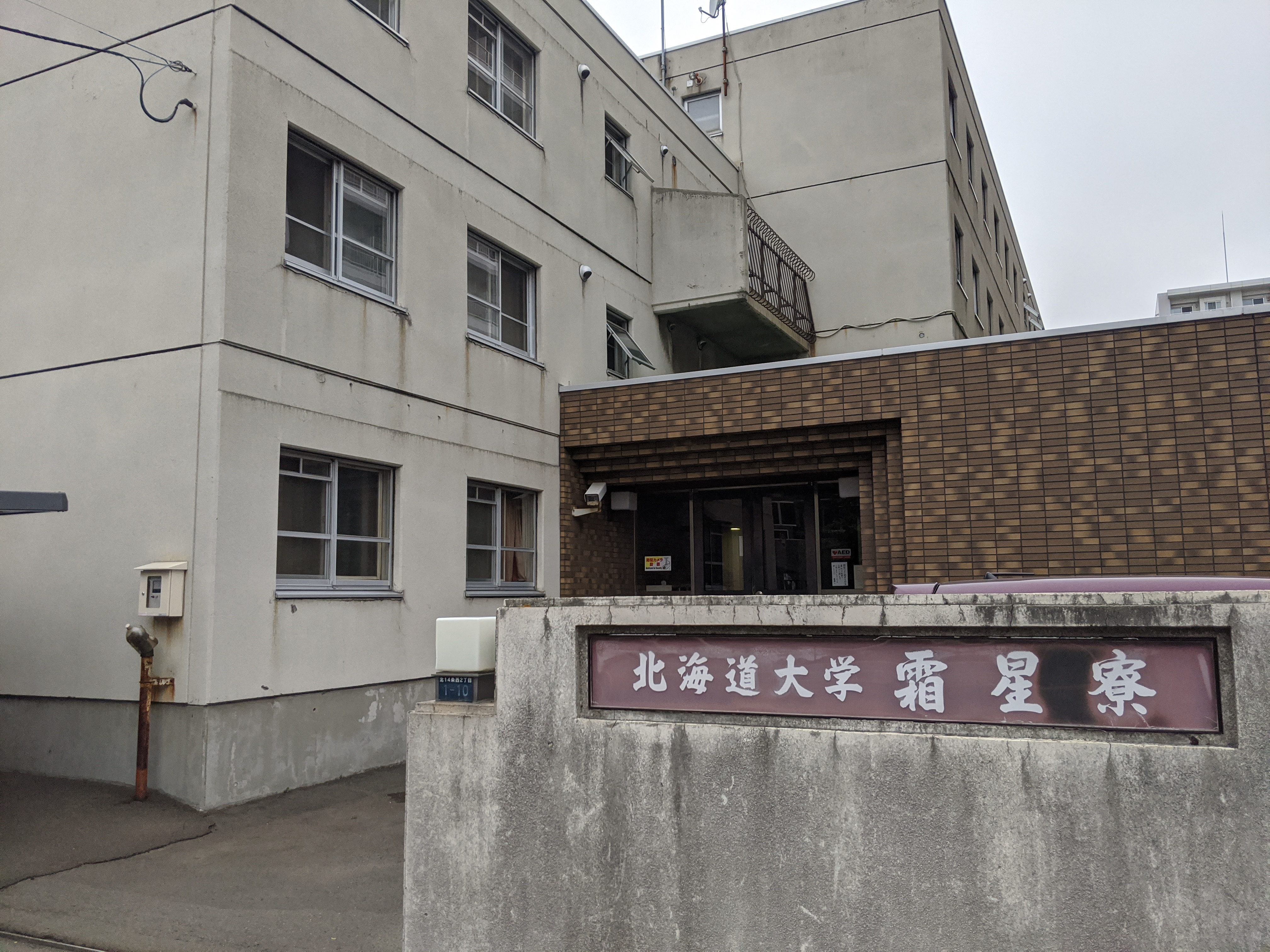 北海道大学の女子学生寮「霜星寮」の入り口の様子。